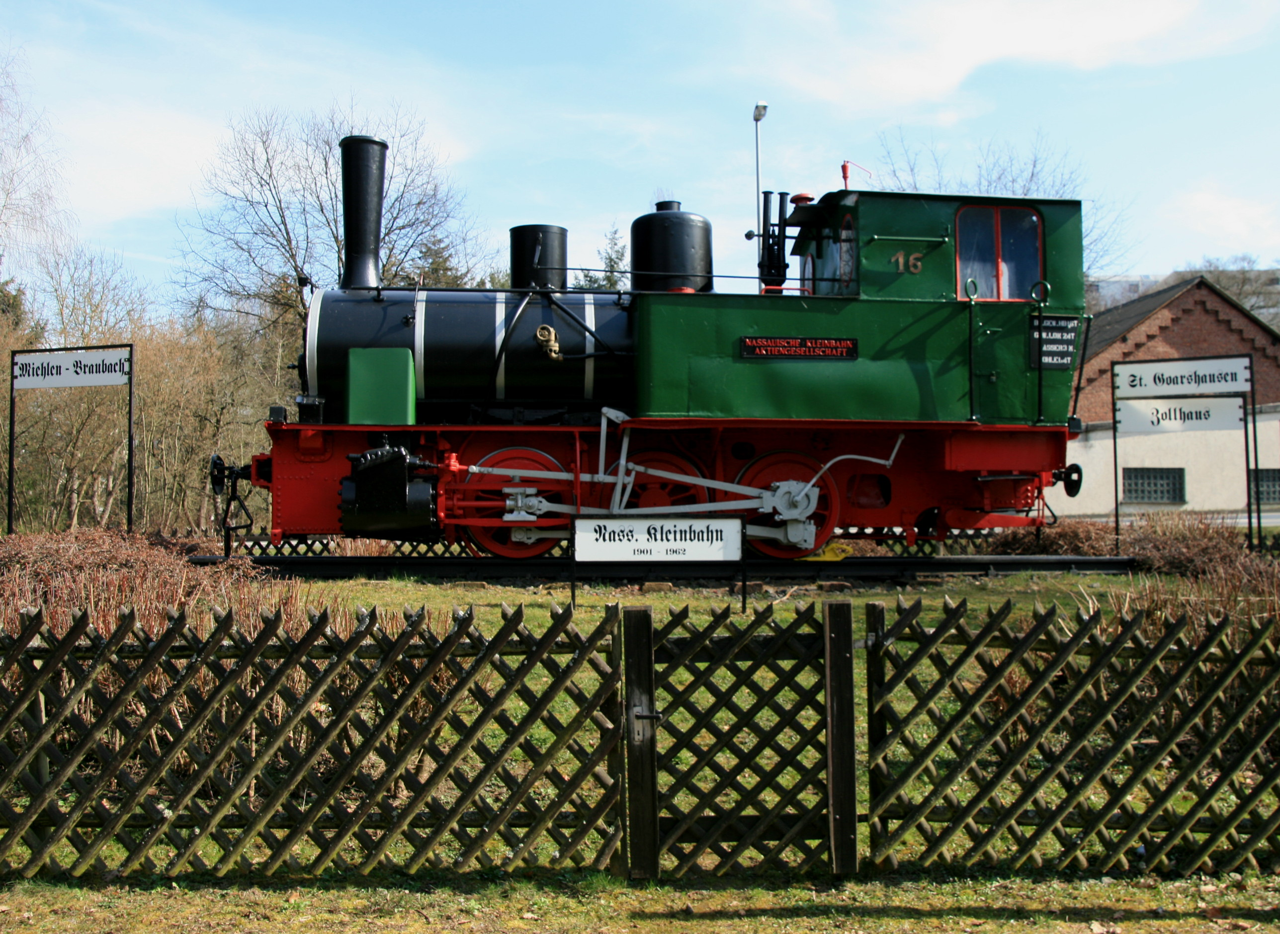 Denkmallok an ihrem ehemaligen Standort in Nastätten: Es handelt sich um eine Dreikuppler-Henschellokomotive aus dem Jahr 1899.Sie wurde zunächst für die Kleinbahn Selters-Hachenburg gebaut und hatte dort die Betriebsnummer 2. 1957 kam sie in Besitz der Nassausichen Kleinbahn AG und fuhr dort unter der Betriebsnummer 16. 1962 wurde sie als letzte Lok ausgemustert. Am 13. Juni 1981 wurde die restaurierte Lok als Erinnerung an die Nassausiche Kleinbahn dort aufgestellt, wo die Bahnlinien nach St. Goarshausen und Zollhaus zusammenliefen. 2017 wurde die Lok verkauft und soll vom neuen Eigentümer fahrtüchtig restauriert und als Museumsbahn eingesetzt werden.